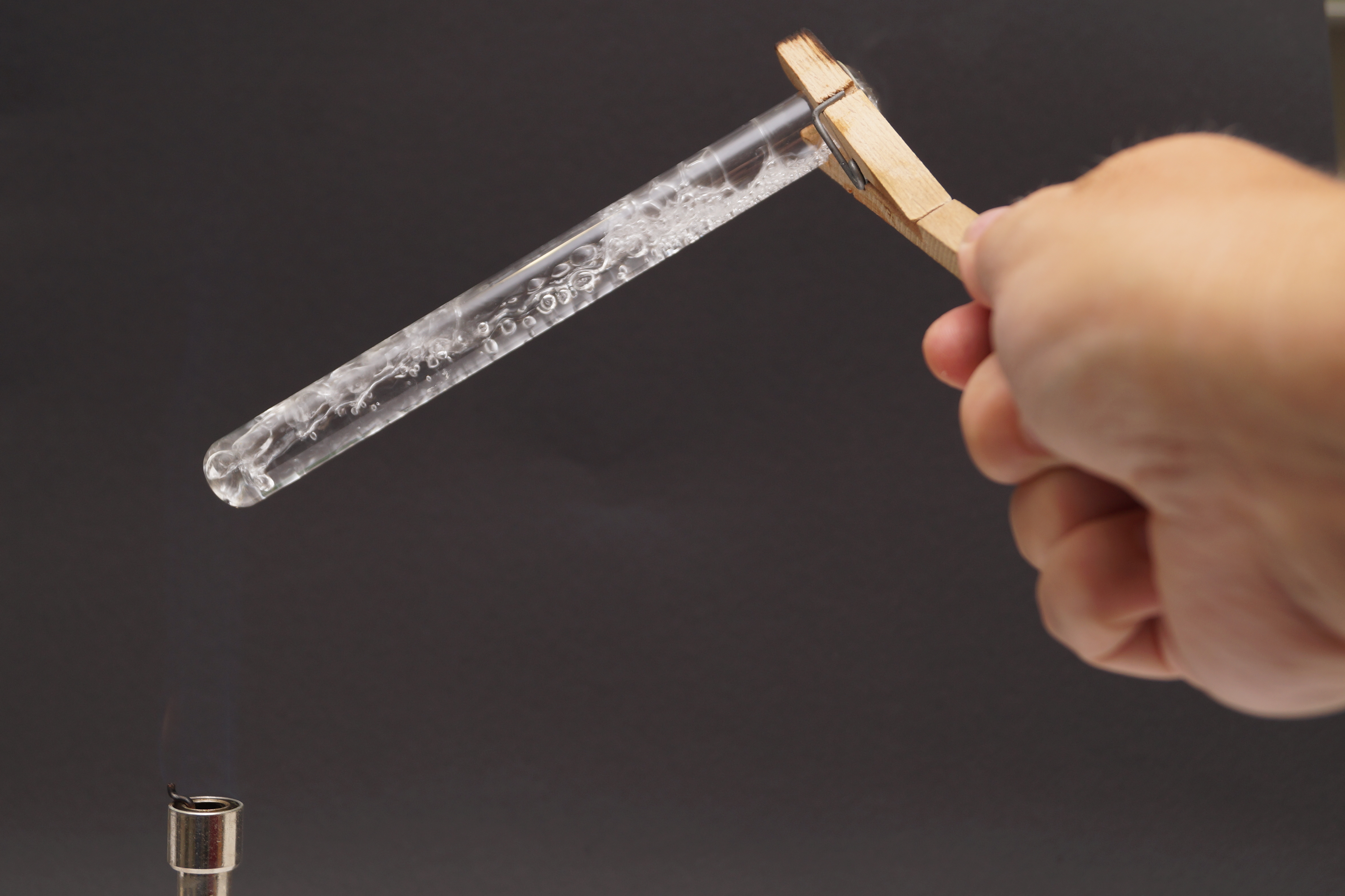 Foto mit Laborgerät um Informationen zur richtigen Handhabung zu geben. Beim Erhitzen von Flüssigkeiten im Reagenzglas können diese schnell überkochen.